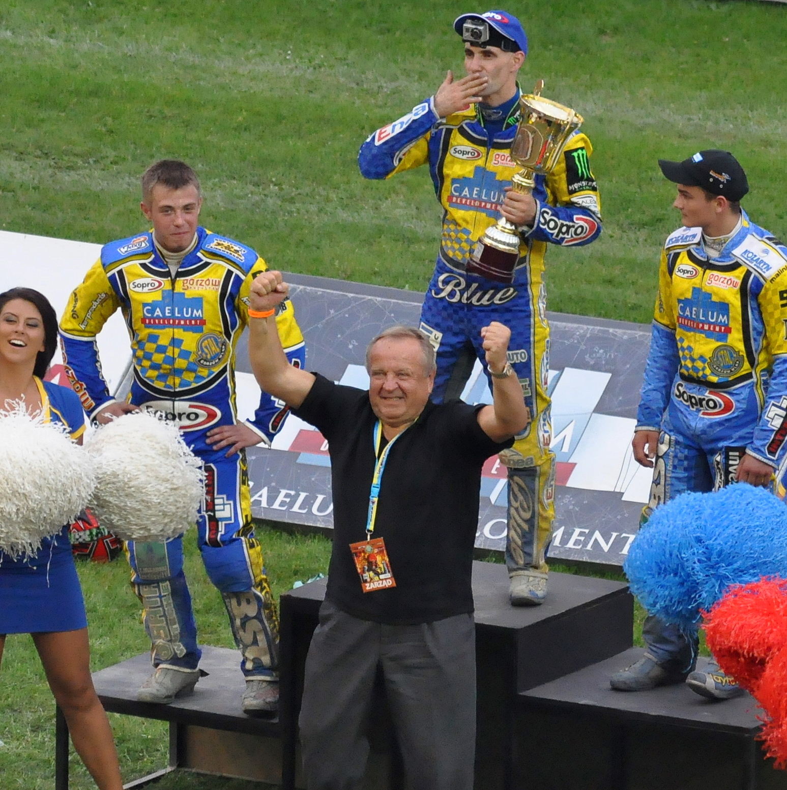 Gorzów Wlkp.- 21. 08. 2015 r. Po meczu ligowym z Unią Leszno, kapitan gospodarzy Tomasz Gollob, wziął udział w nagraniu teledysku do utworu grupy rockowej i metalowej " My Riot " . Na podium stoją również Adrian Cyran i Bartosz Zmarzlik. Nagrywano teledysk „Sam przeciwko wszystkim”.